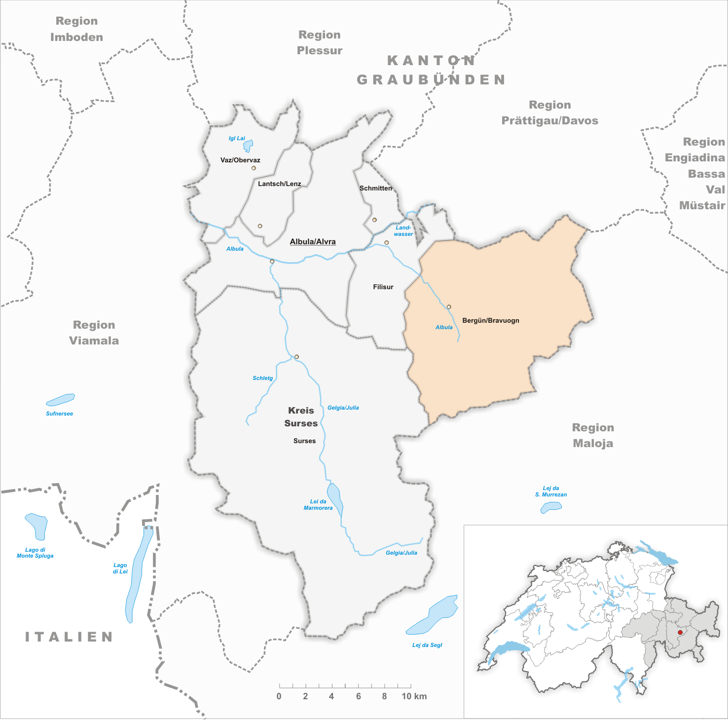 Municipality Bergün/Bravuogn